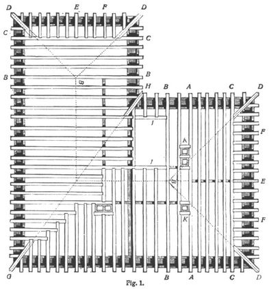 Balkenlage eines Eckgrundrisses